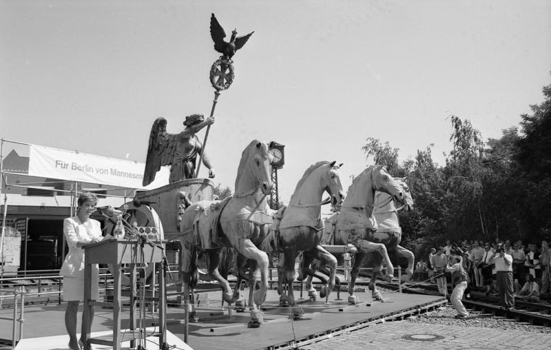 Berlin, 7.7.1991 Die Quadiga des Brandenburger Tores, das von Johann Gottfried Schadow konzipierte kupferne Kunstwerk der Siegesgöttin mit Pferdegespann, wurde nach umfangreicher Restaurierung im Berliner Museum für Verkehr und Technik feierlich enthüllt. Nach schweren Beschädigungen in der Silvesternacht 1989/1990 waren aufwendige Restaurierungsarbeiten erforderlich geworden, die mehr als 200 000 DM kosteten. Zum 200. Geburtstag des Brandenburger Tores am 6.8.1991 wird die 1789 in Auftrag gegebene und 1794 fertiggestellte Quadrina wieder an ihrem alten Platz auf dem Brandenburger Tor sein.